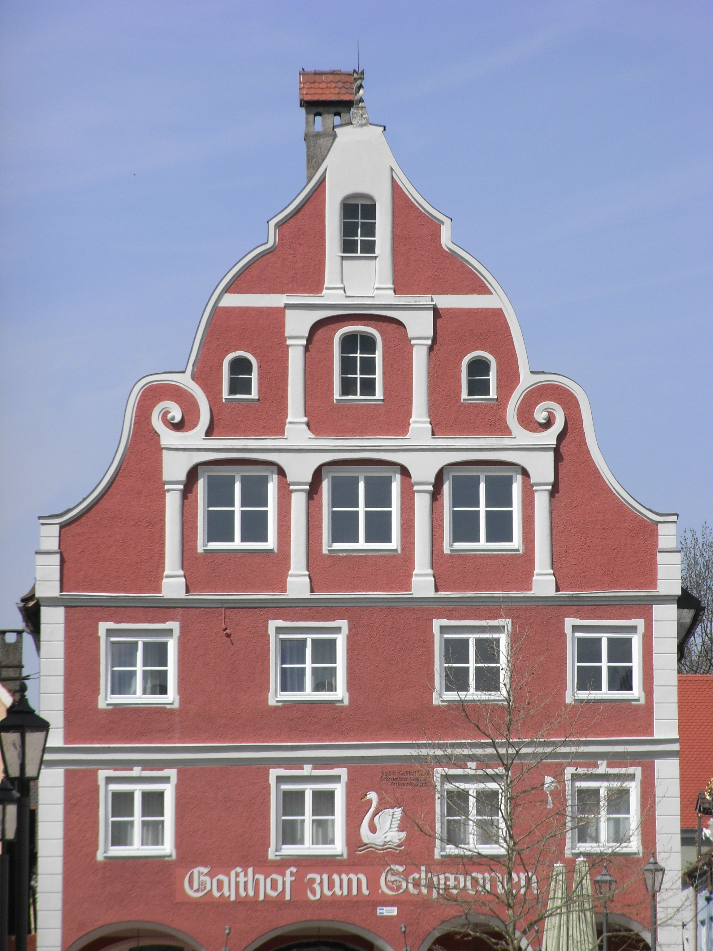 Das ehemals beste Gasthaus der Mittelalterzeit in der Stadt (die ehemalige Krone oben am Dach läßt es erkennen), der heutige Schwanen